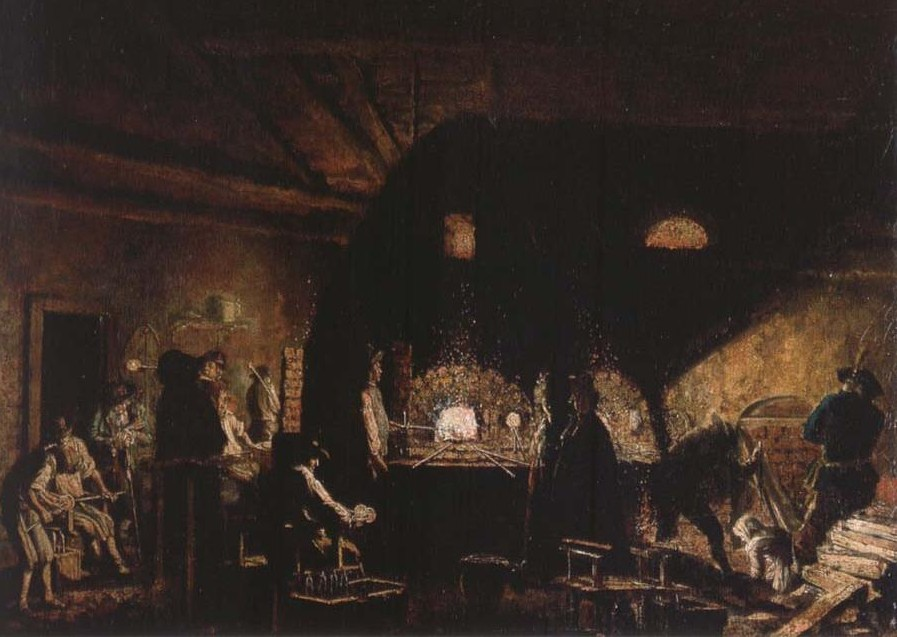 Interiör från Kungsholms glasbruk i Stockholmtitle QS:P1476,sv:"Interiör från Kungsholms glasbruk i Stockholm" label QS:Lsv,"Interiör från Kungsholms glasbruk i Stockholm"